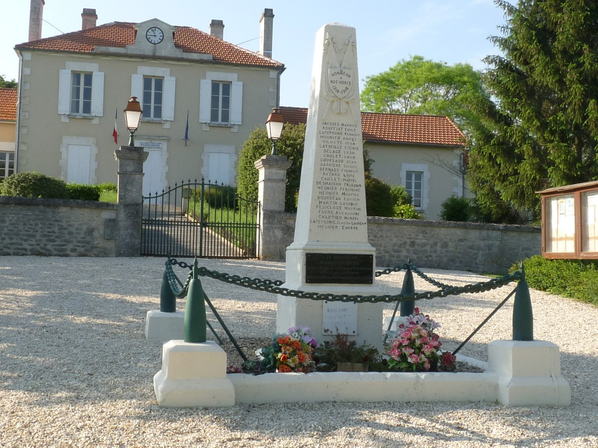 Monument aux morts en face de la mairie de Gardes-Le-Pontaroux (Charente, France)